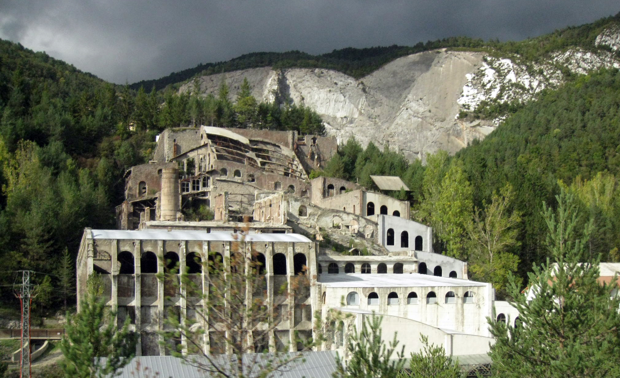 Antiga fàbrica de ciment Asland al Clot del Moro (Castellar de n'Hug)